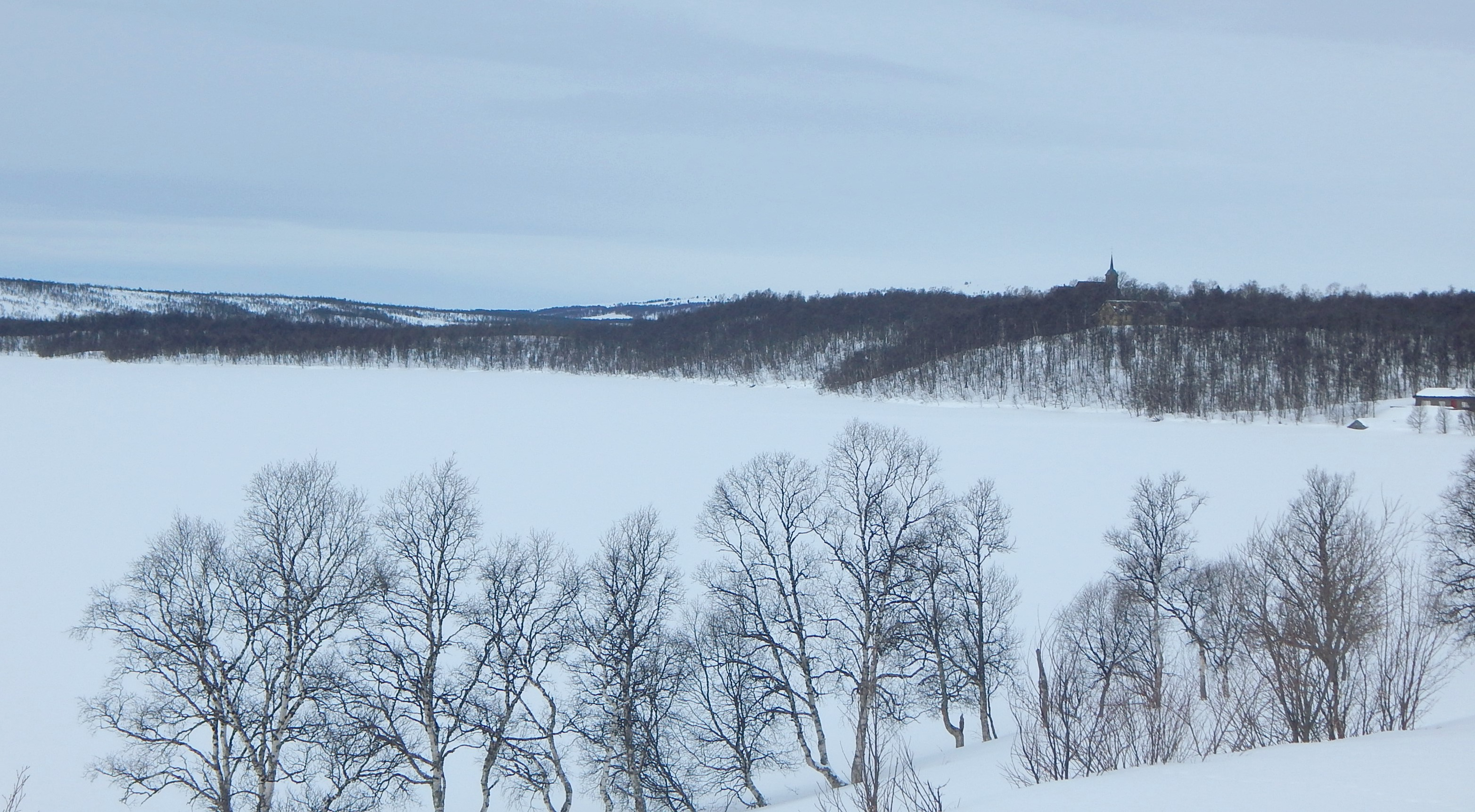 Storhittersjøen i Røros kommune, islagt i mars. Hitterdal kapell i bakgrunnen.